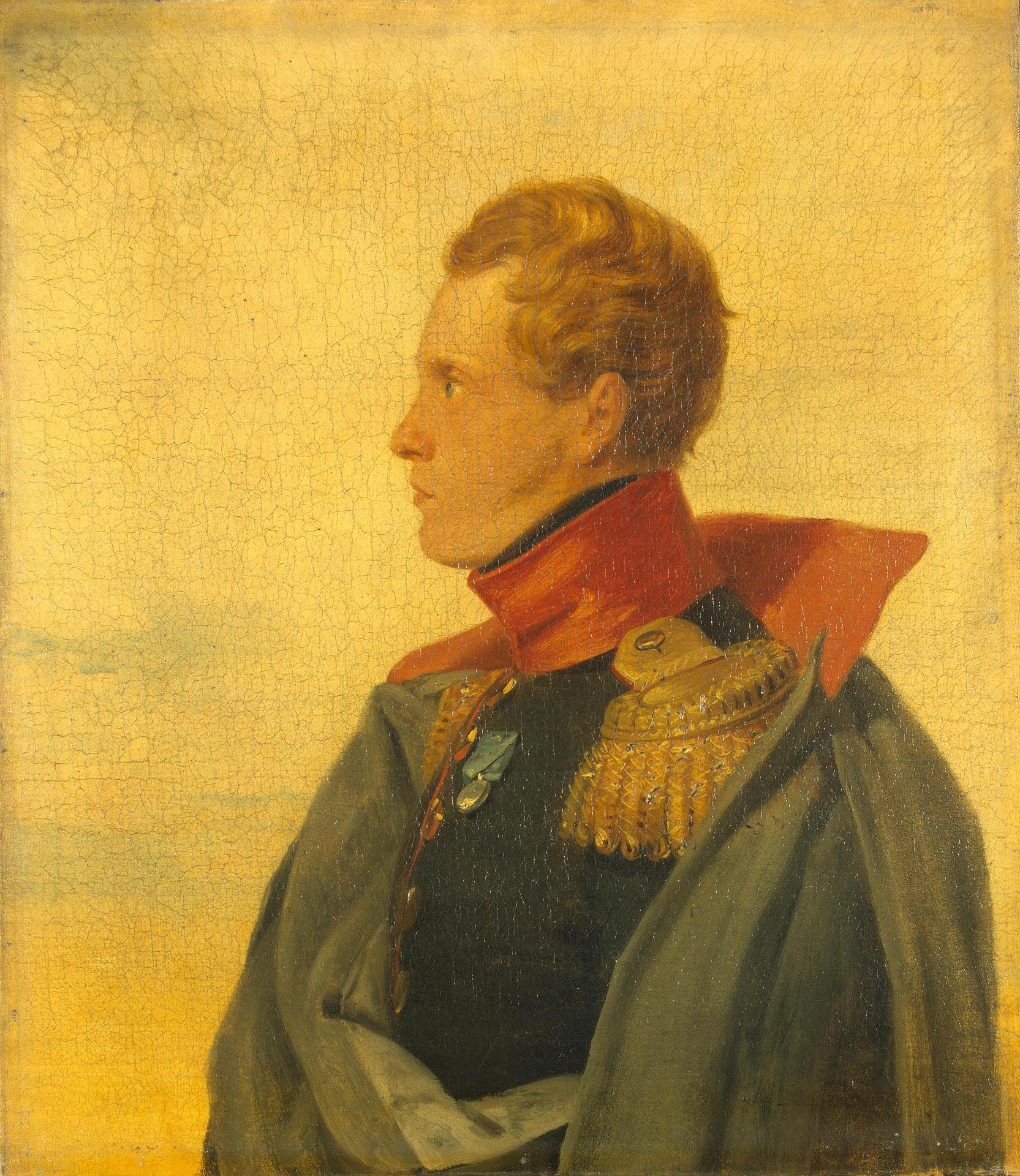 Ivan Bogdanovich Reren (07.12.1775 – 07.10.1813) russian general